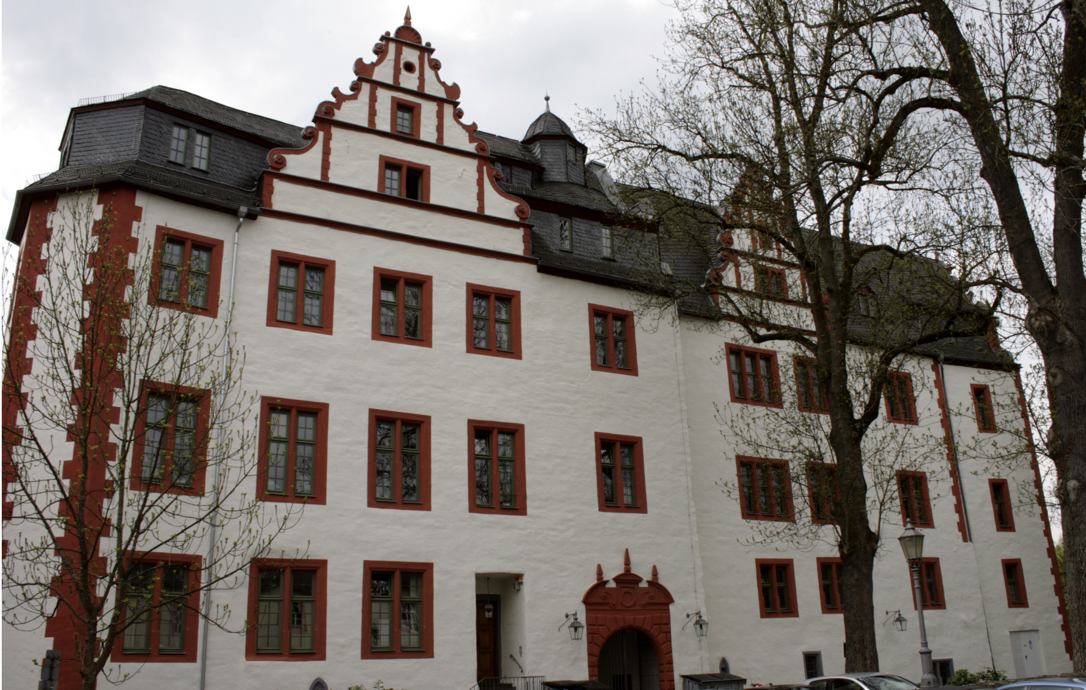 Nordflügel Schloss Hadamar, Deutschland